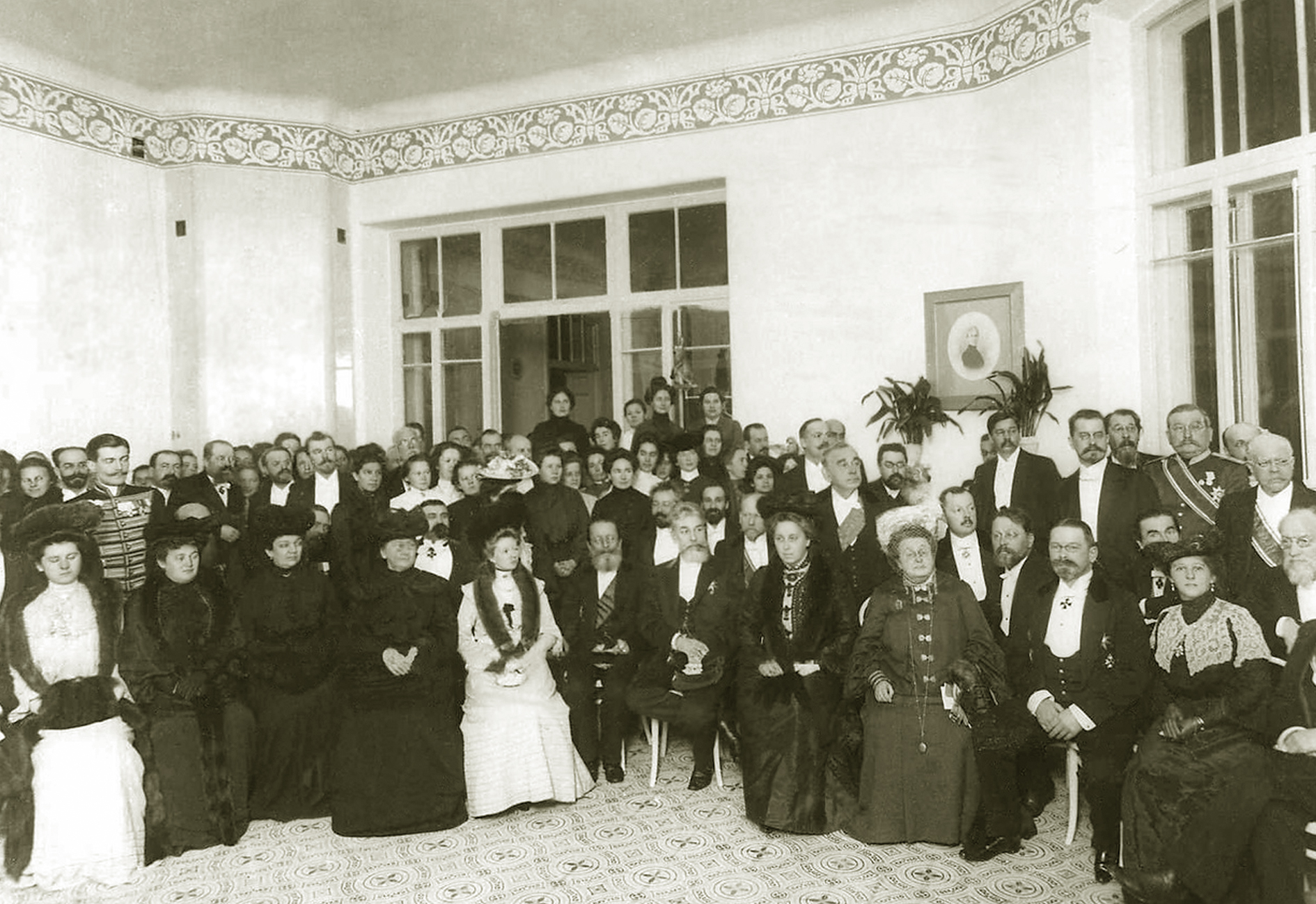 Группа попечителей детской клиники Женского медицинского института в Петербурге